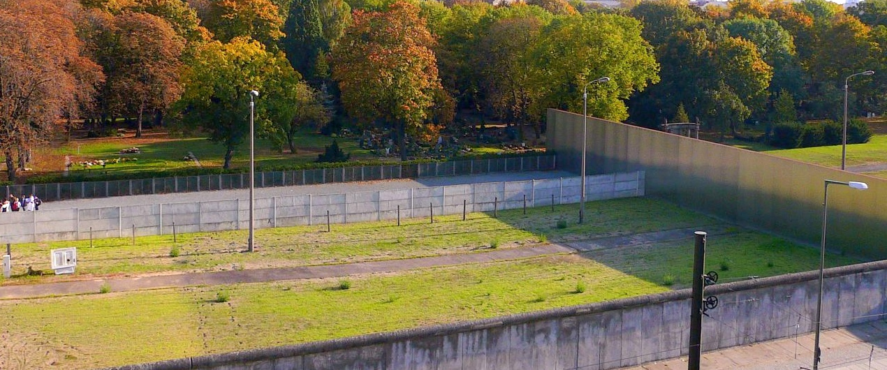 Die Gedenkstätte Berliner Mauer an der Bernauer Straße, an der Grenze Berlin-Mitte und Berlin-Gesundbrunnen